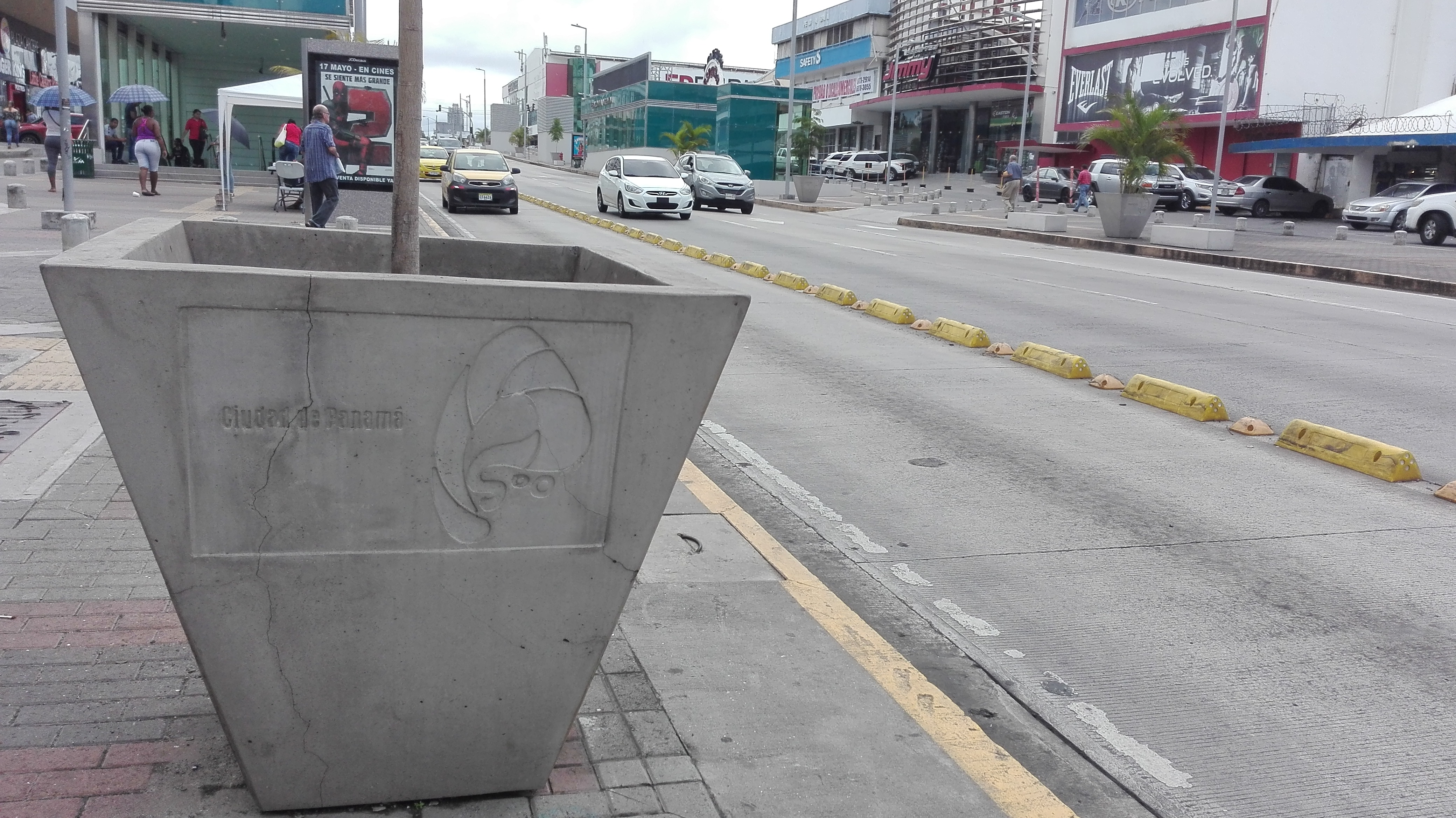 Potes de plantas con el logo de los 500 años de fundación de la ciudad, como parte del mobiliario urbano de la Vía España en la ciudad de Panamá.